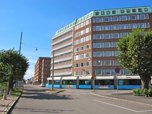 Spårvagn på Stampgatan i Stampen i Göteborg